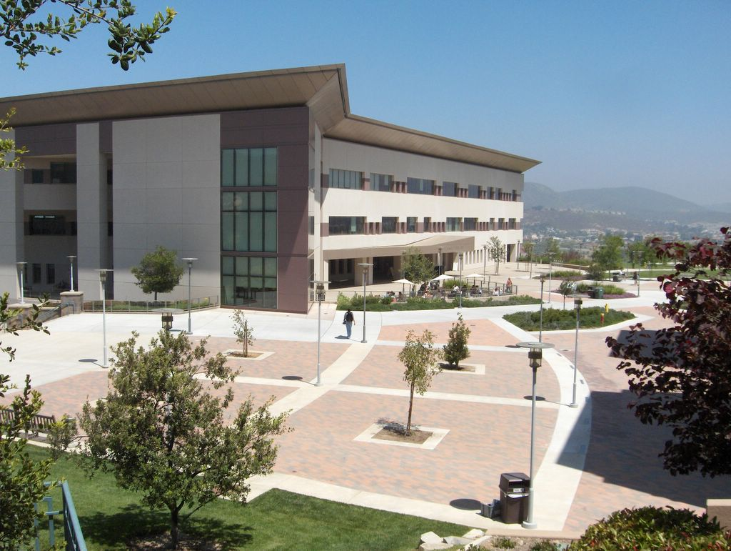 Cal State Buchhandlung.